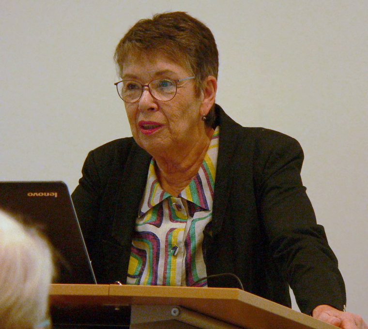 Barbara Schock-Werner im NLD in Hannover